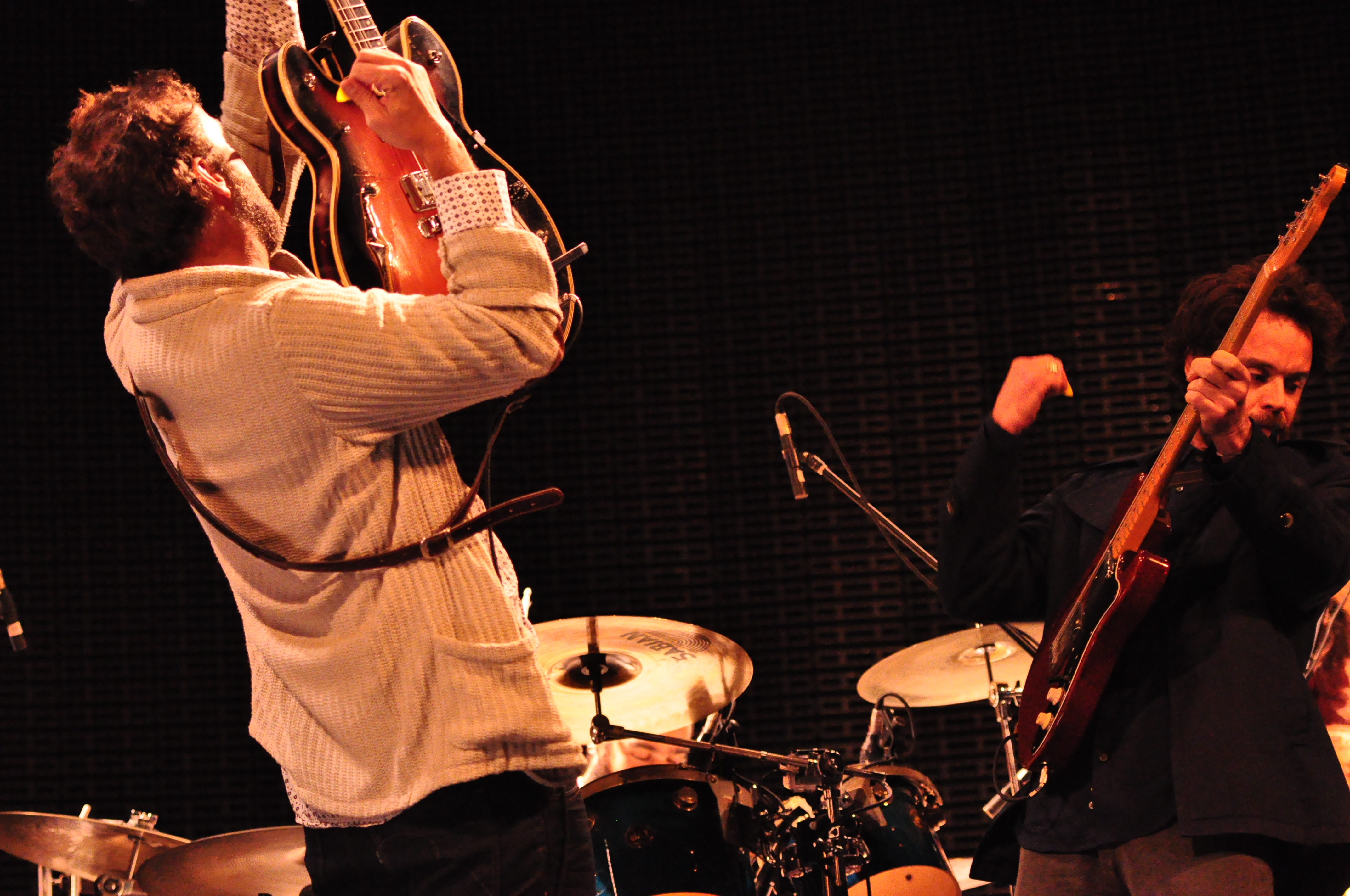 Foto: Priscila Leal